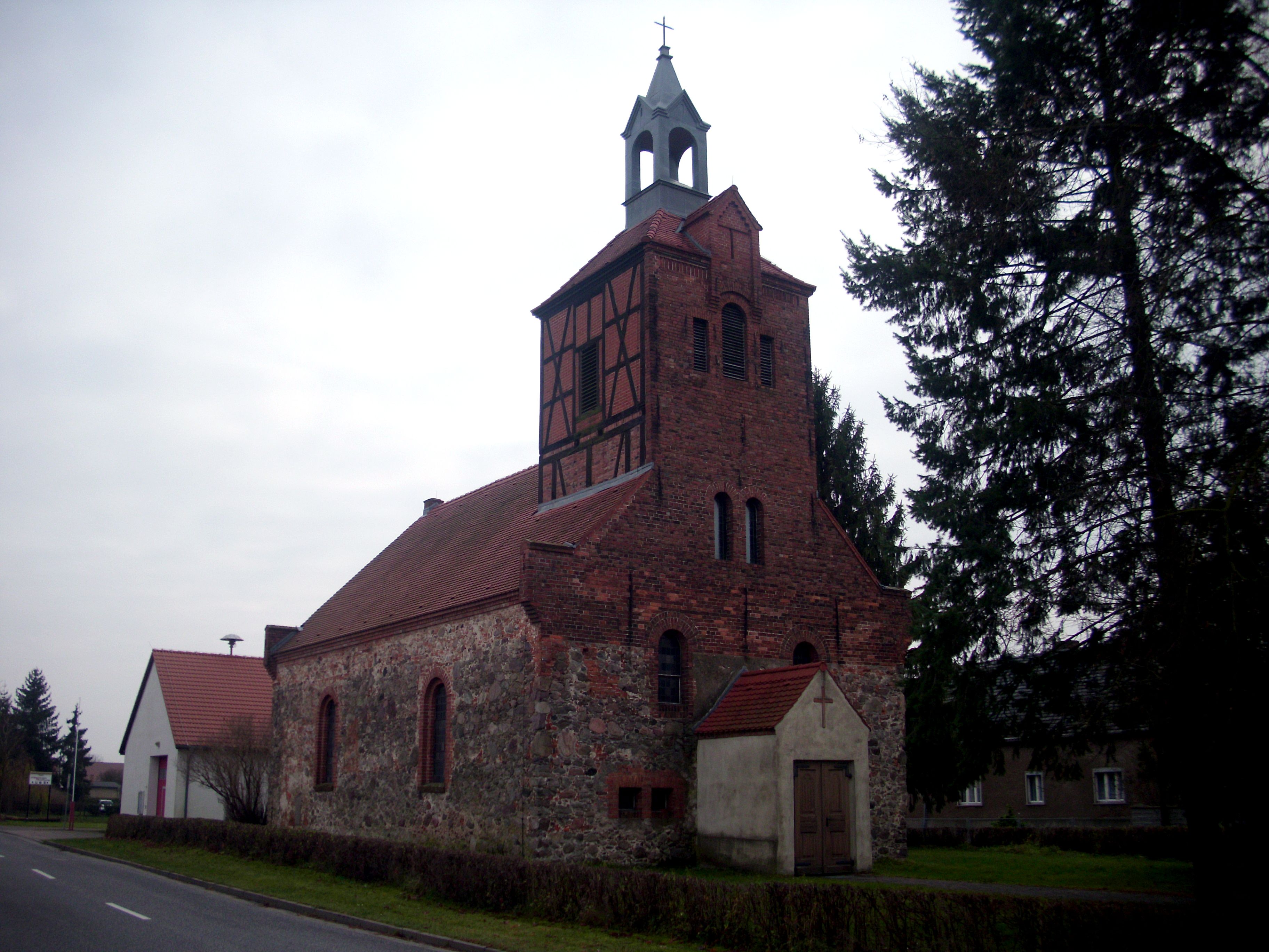 Dorfkirche Ragow, Gemeinde Ragow-Merz im Landkreis Oder-Spree, Brandenburg